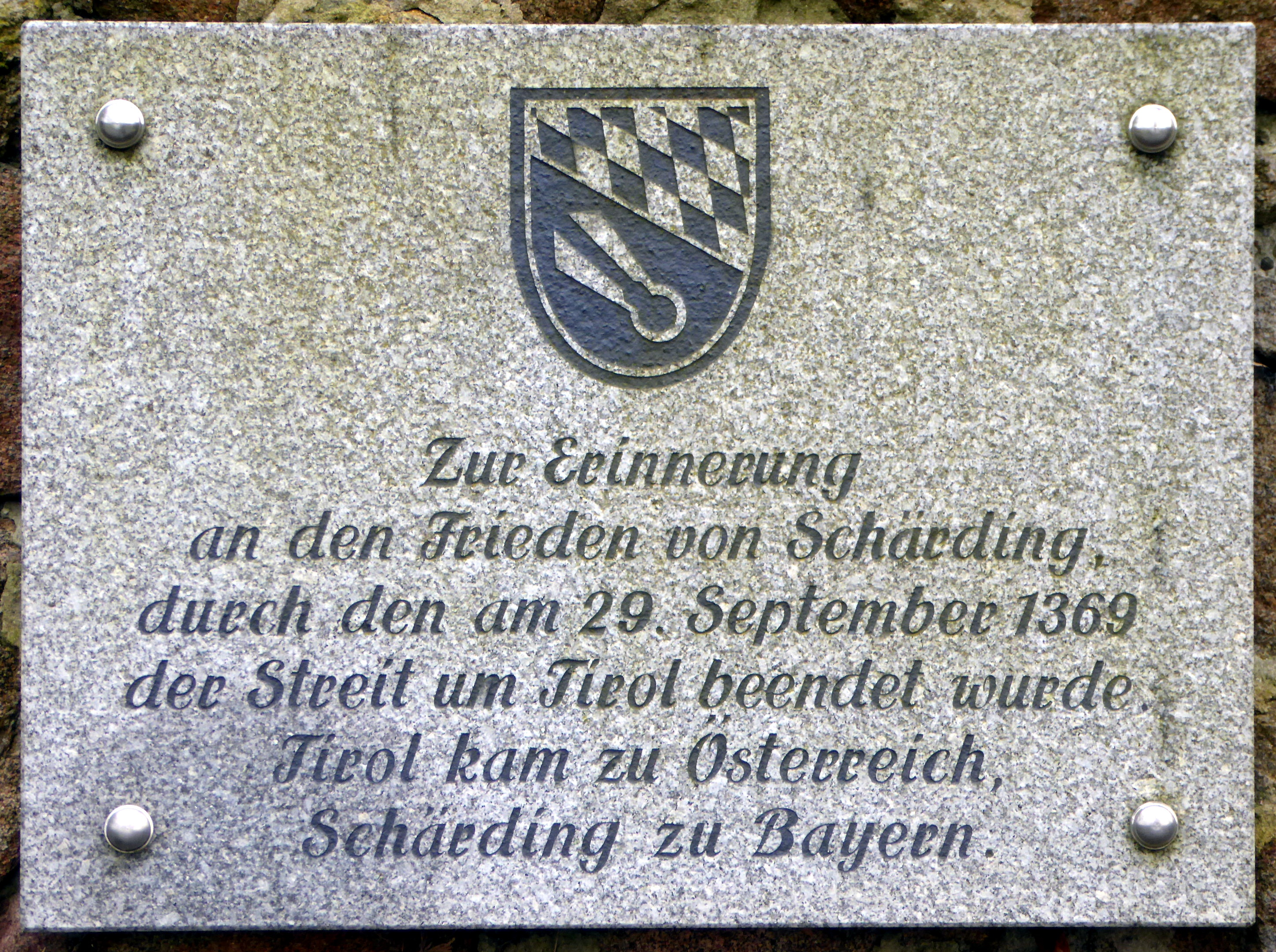 Schärding, Erinnerungstafel an den Frieden von Schärding.